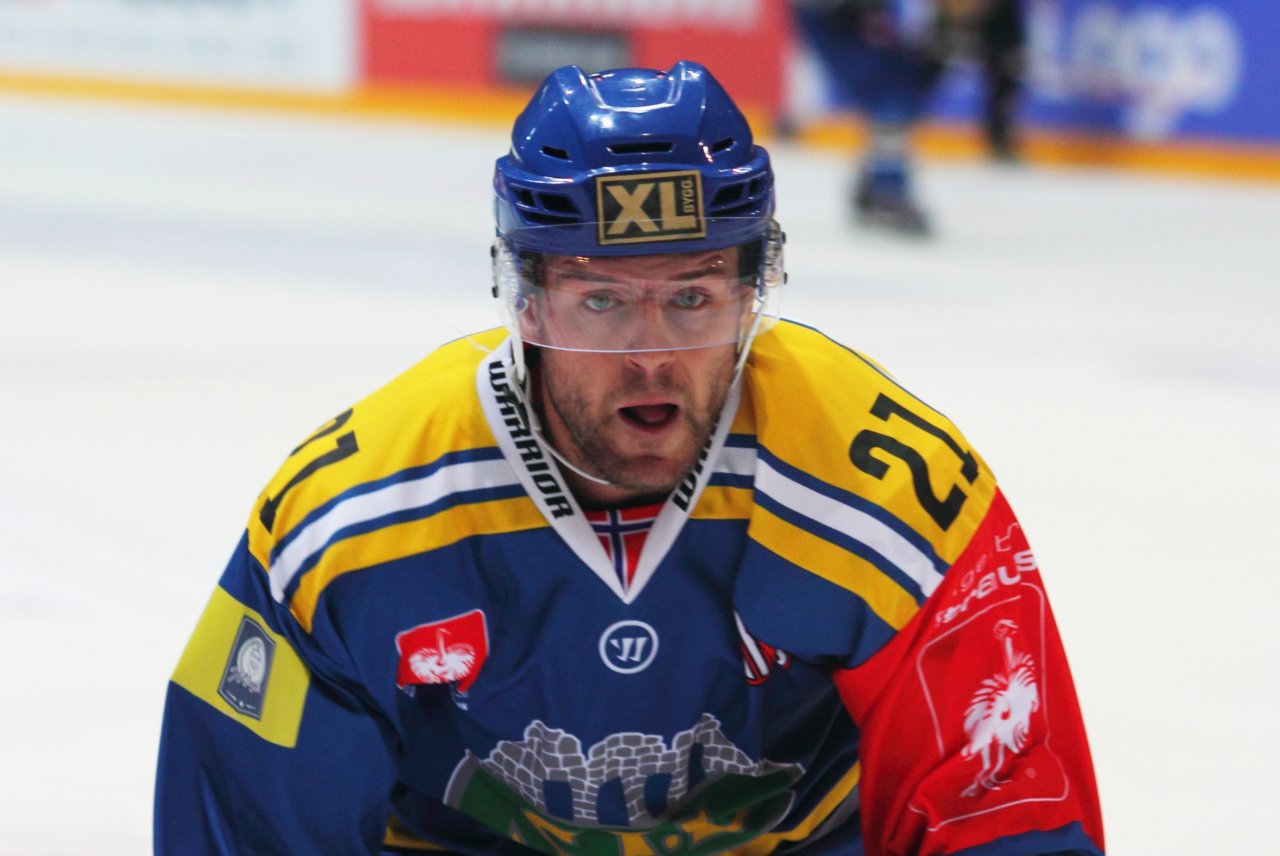 Joakim Jensen (H 21).